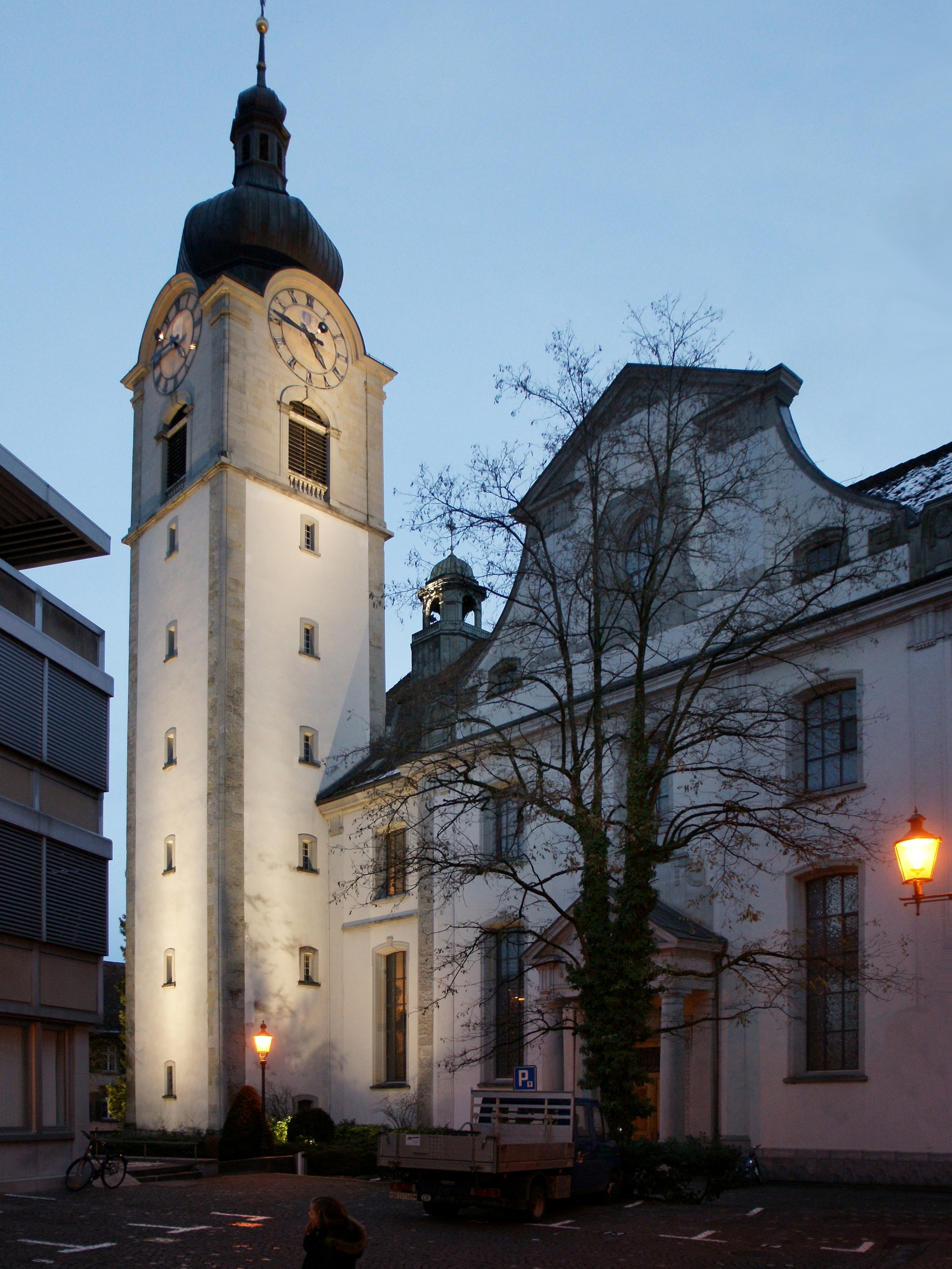 Katholische Pfarrkirche St.Nikolaus, im "Städtle" von Altstätten, erbaut 1794/98 vom Altstätter Baumeister Johann Jakob Haltiner im spätbarocken Stil.